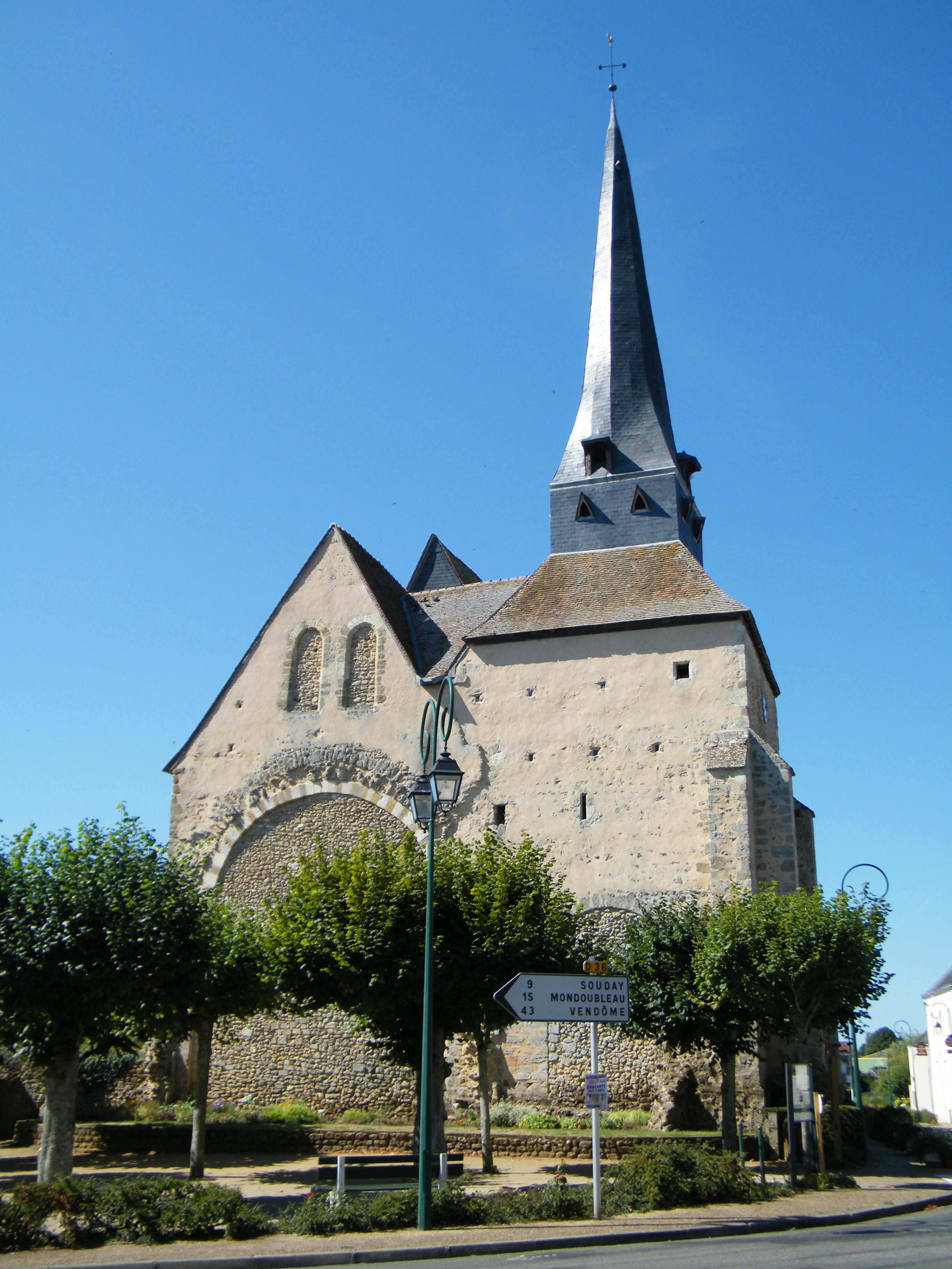 Melleray, Sarthe,, Fr, église (4)